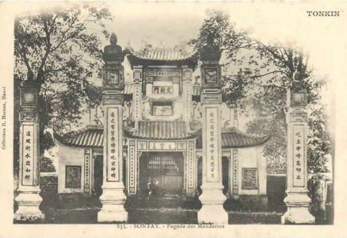 Cổng Tam quan Văn miếu môn Sơn Tây tỉnh Sơn Tây nhà Nguyễn, tồn tại đến thời Pháp thuộc.